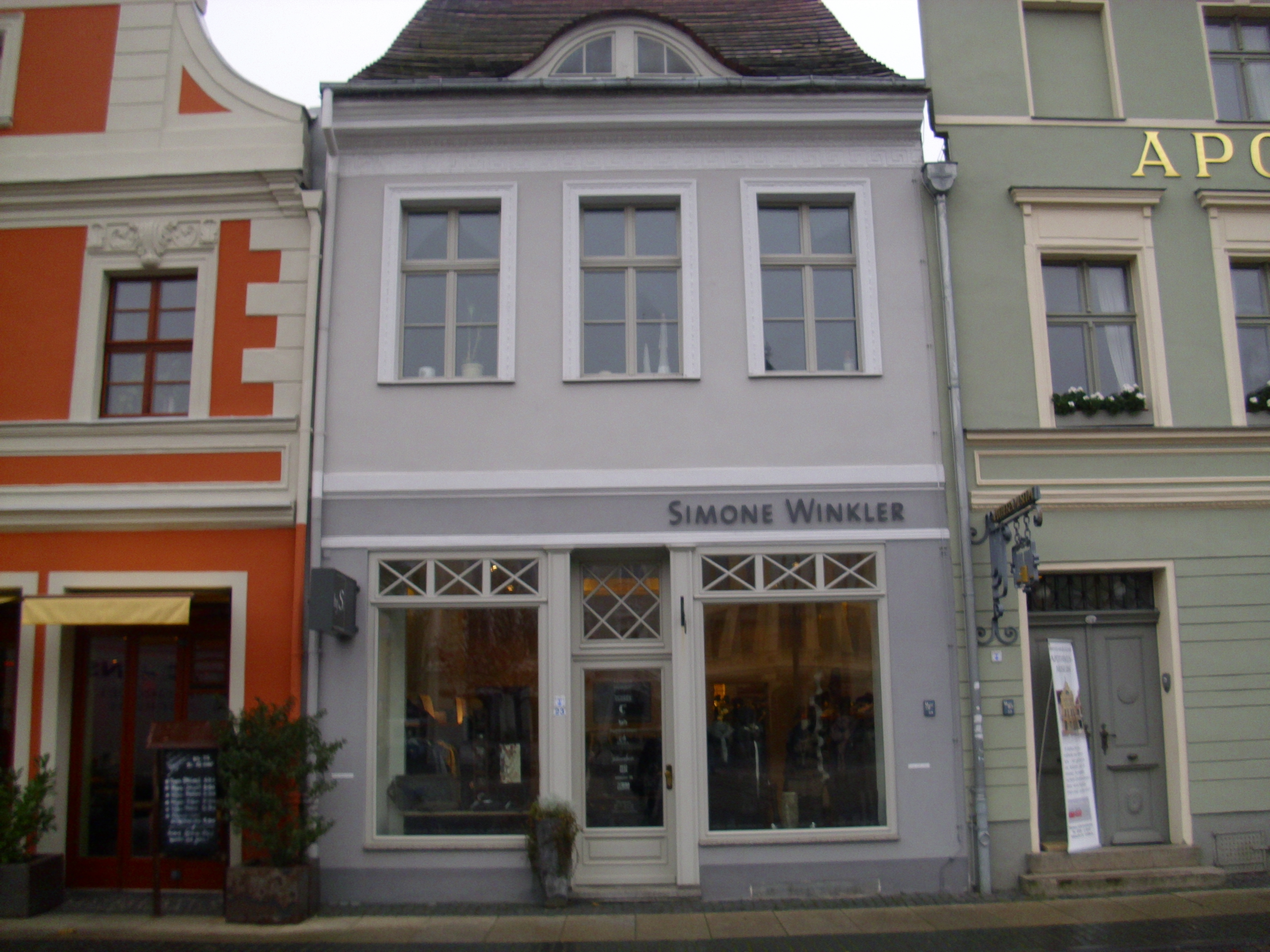 Altmarkt23